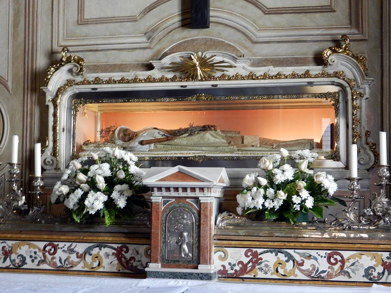 Brescia - Urna con le spoglie di S. Angela Merici nell'omonima chiesa